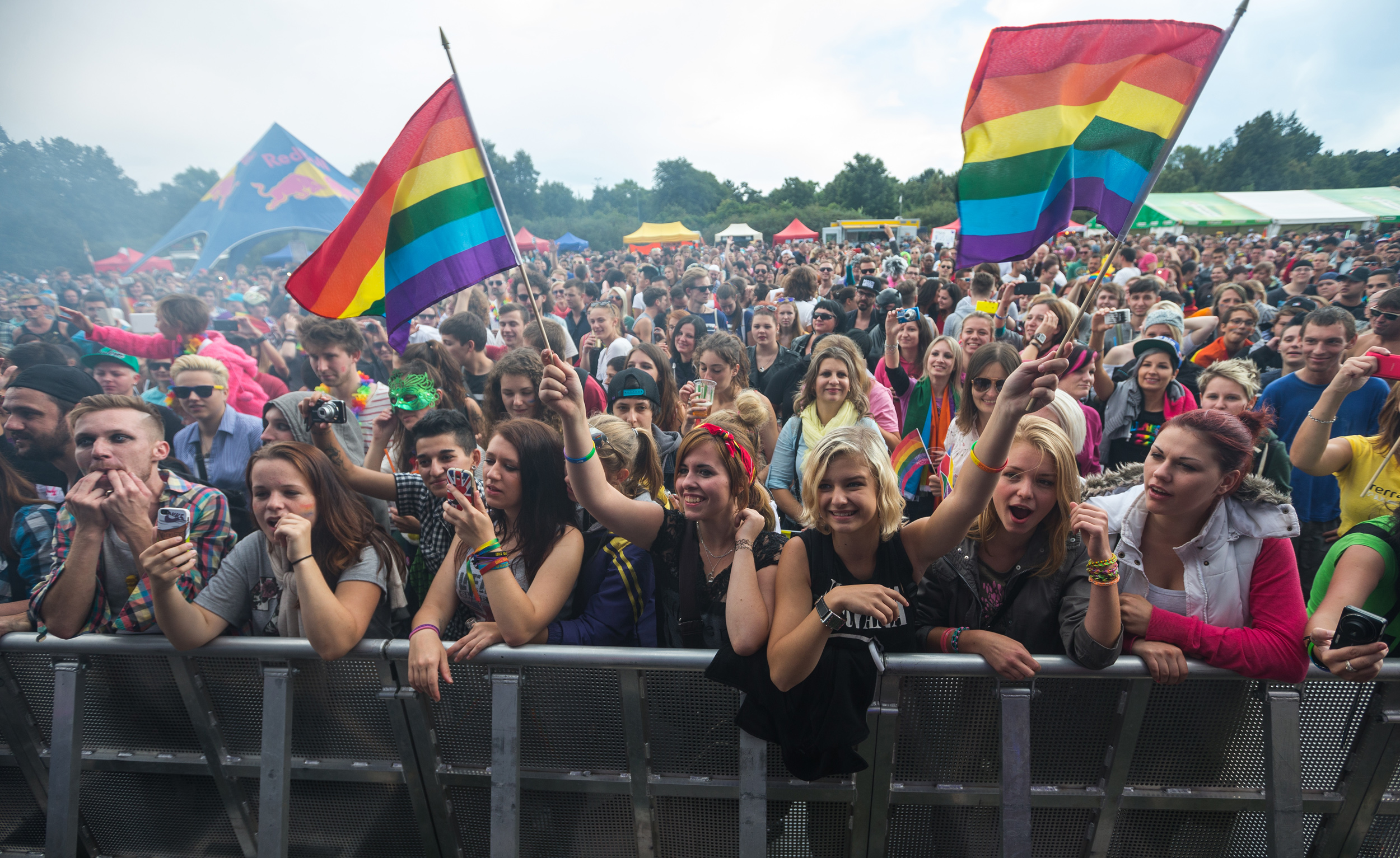 Prague Pride 2014, publikum odpoledního hudebního festivalu na Letenské pláni